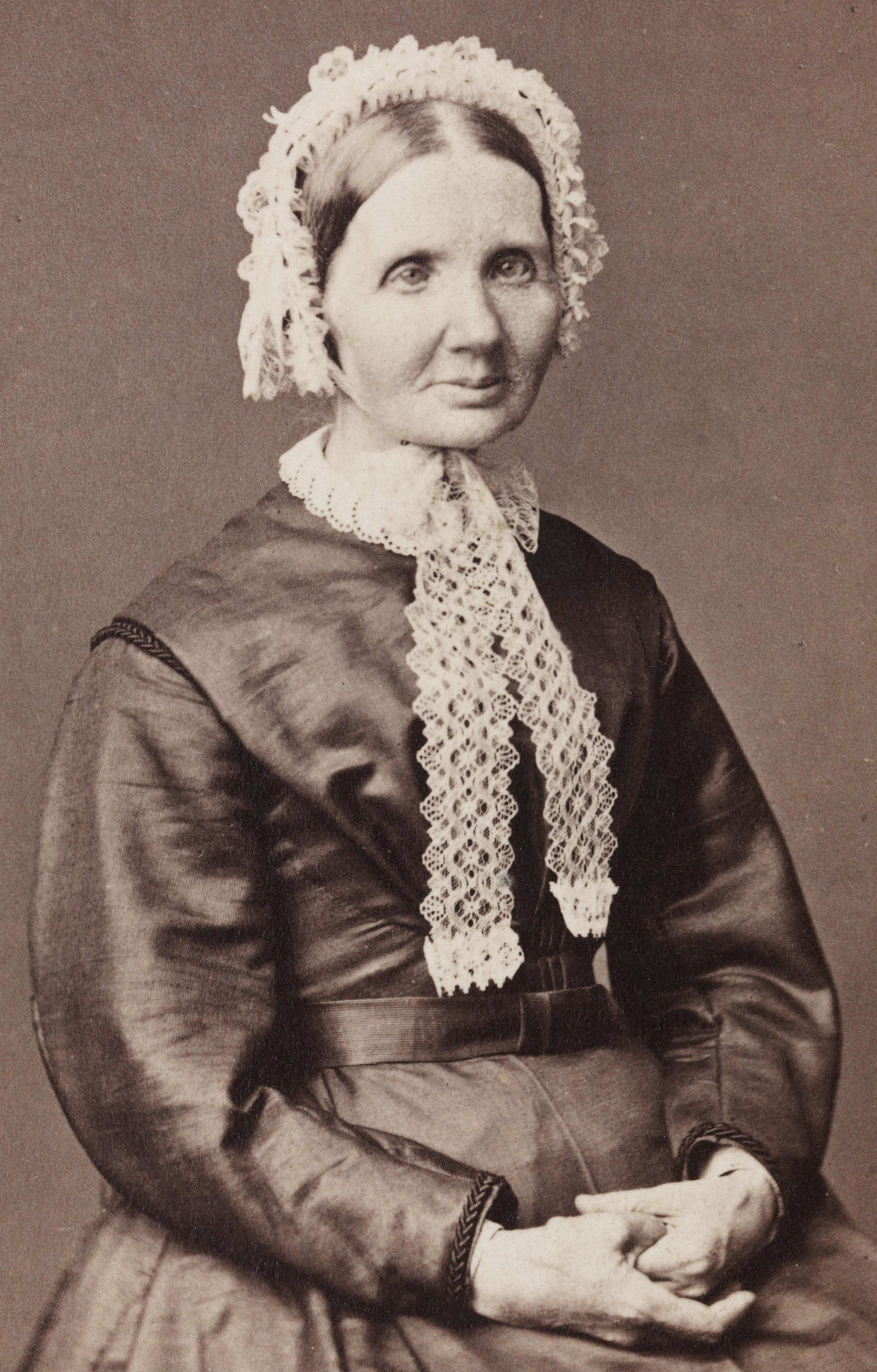 Bildet er hentet fra Nasjonalbibliotekets bildesamling Depicted person: Brochmann, fru. This is Sara Jessine Louise Brock Daae (1811–91), wife to Ludvig Daae (1806–35), they were parents to Ludvig Daae. Married again in 1840, to lutheran priest i Kvinesdal, Diderik Hegermann Brochmann (1808–75).[1]